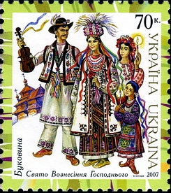 Марка з серії "Народний одяг України" 2007 Буковина. Вознесіння Господнє